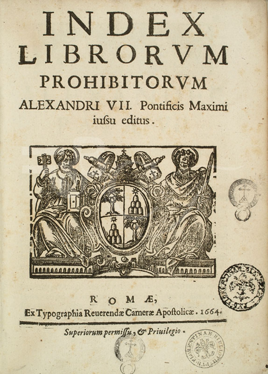 Index Librorum Prohibitorum, aggiornato sotto papa Alessandro VII, Roma 1664